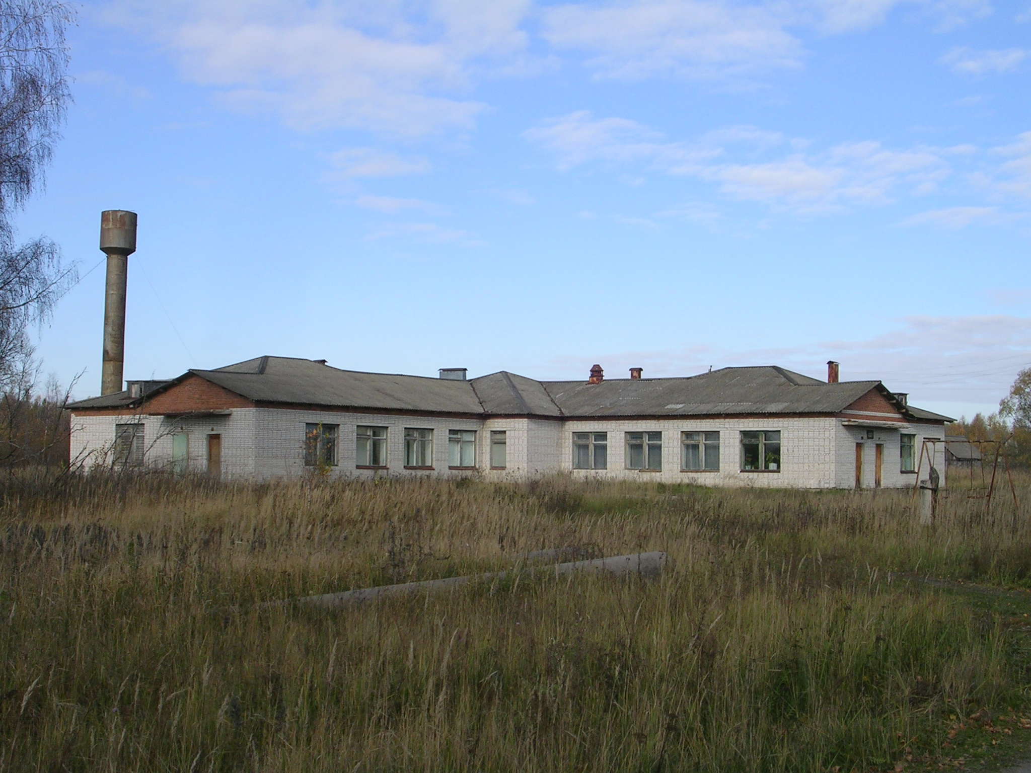 Тихоновский медицинский пункт